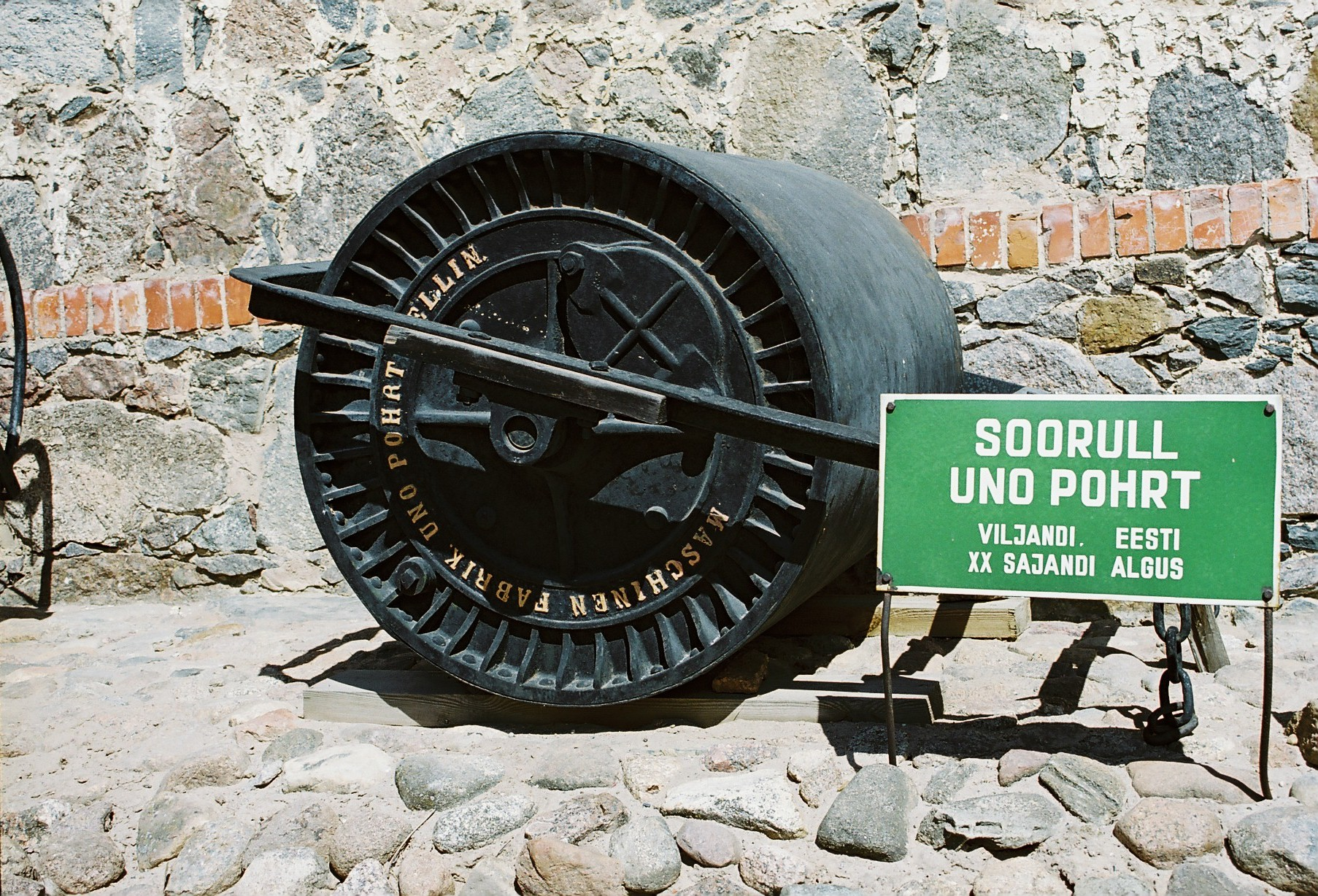 Soorull, Uno Pohrt